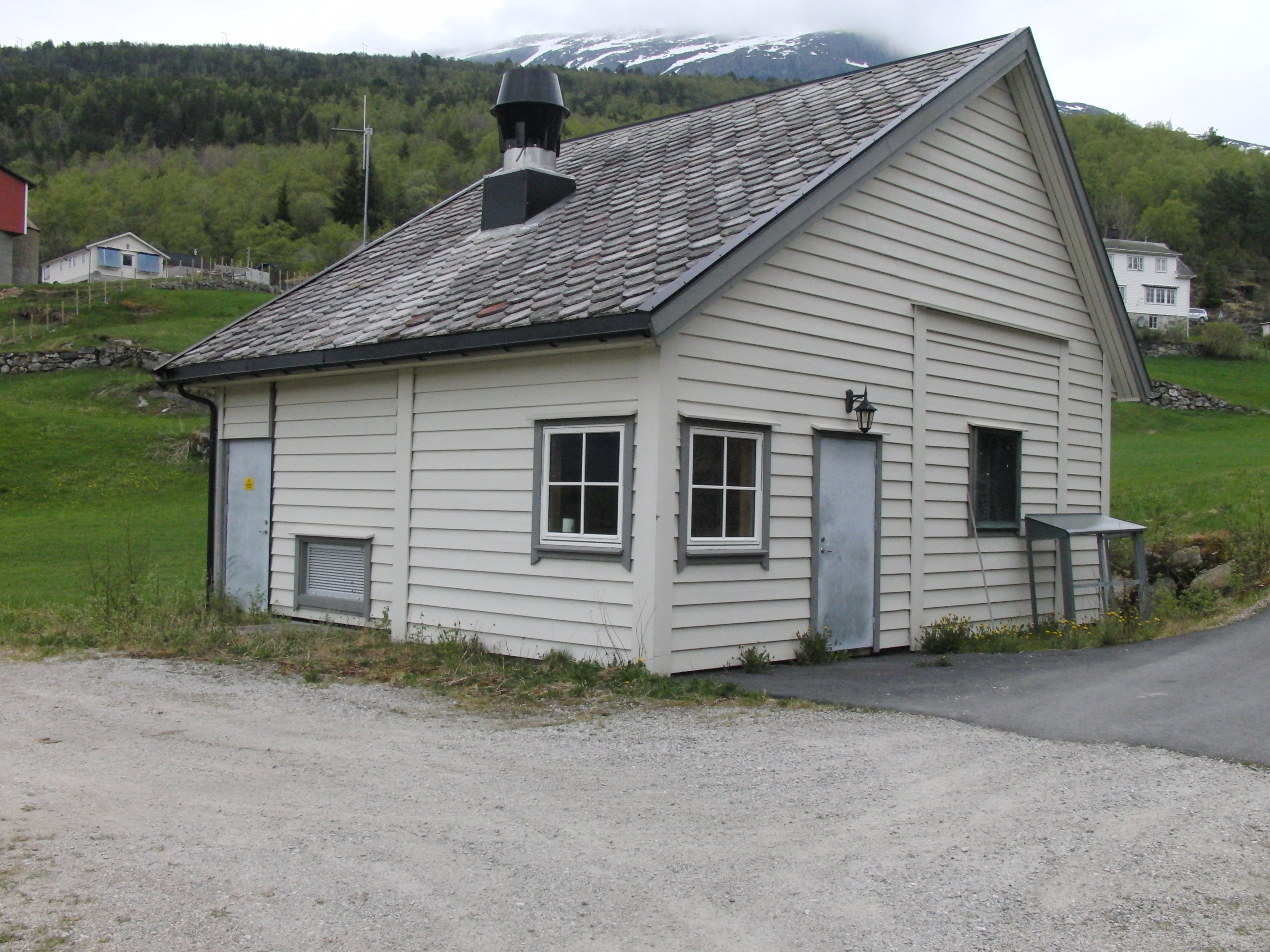 Årdal Øvre kraftverk